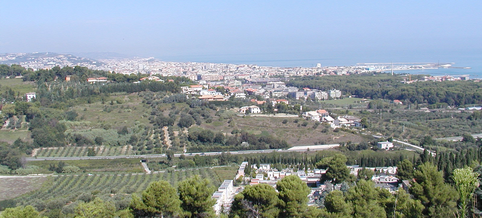 Das Panorama von Pescara vom Süden (klein)